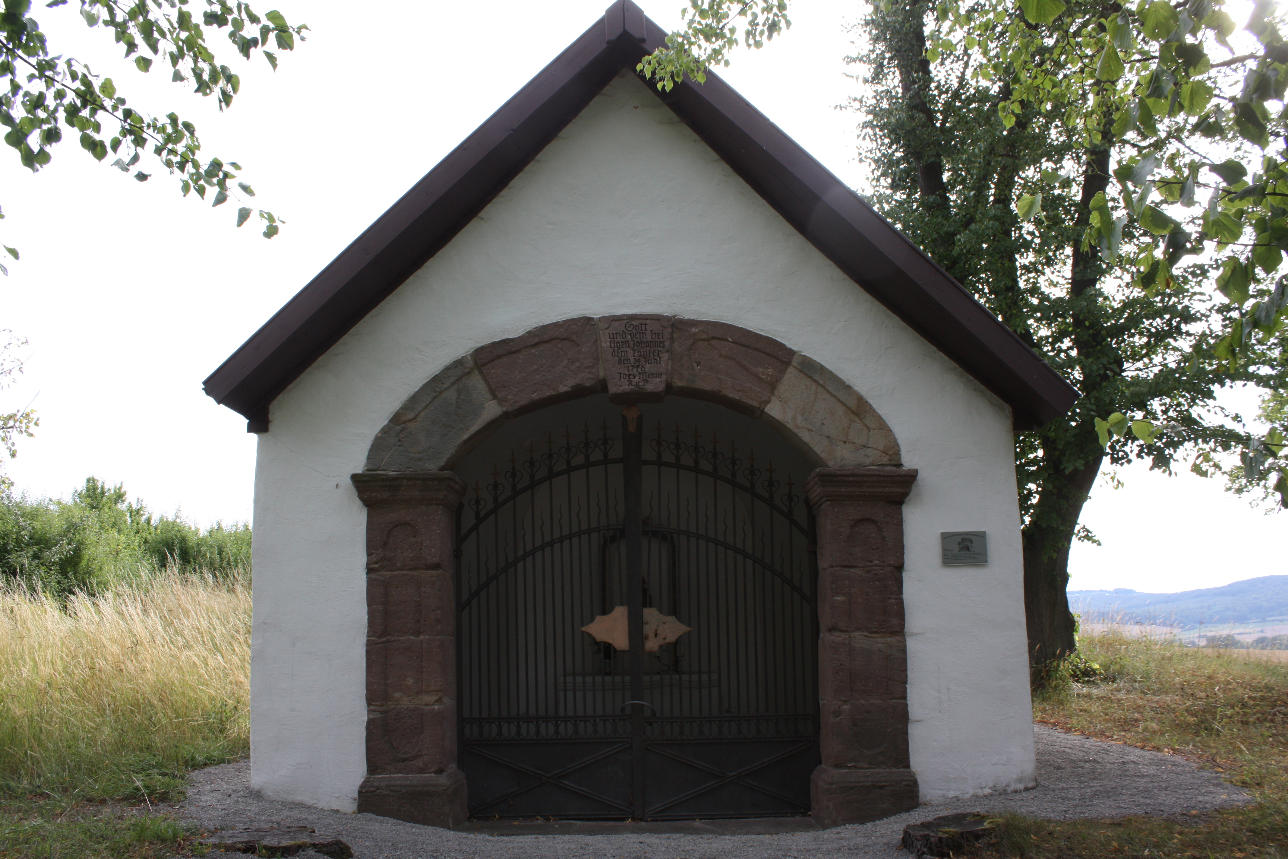 Johannes-Kapelle in Warburg-Ossendorf 1776 vom Richter Johannes Menne erbaut. Inschrift "Gott und dem Heiligen Johannes dem Täufer den 24. Juni 1776 Joes Menne R. u. P." (Richter und Posthalter. Seit 1776 zieht die Prozession am Patronenfest St. Johannes Enthauptung zur Johannes Kapelle.